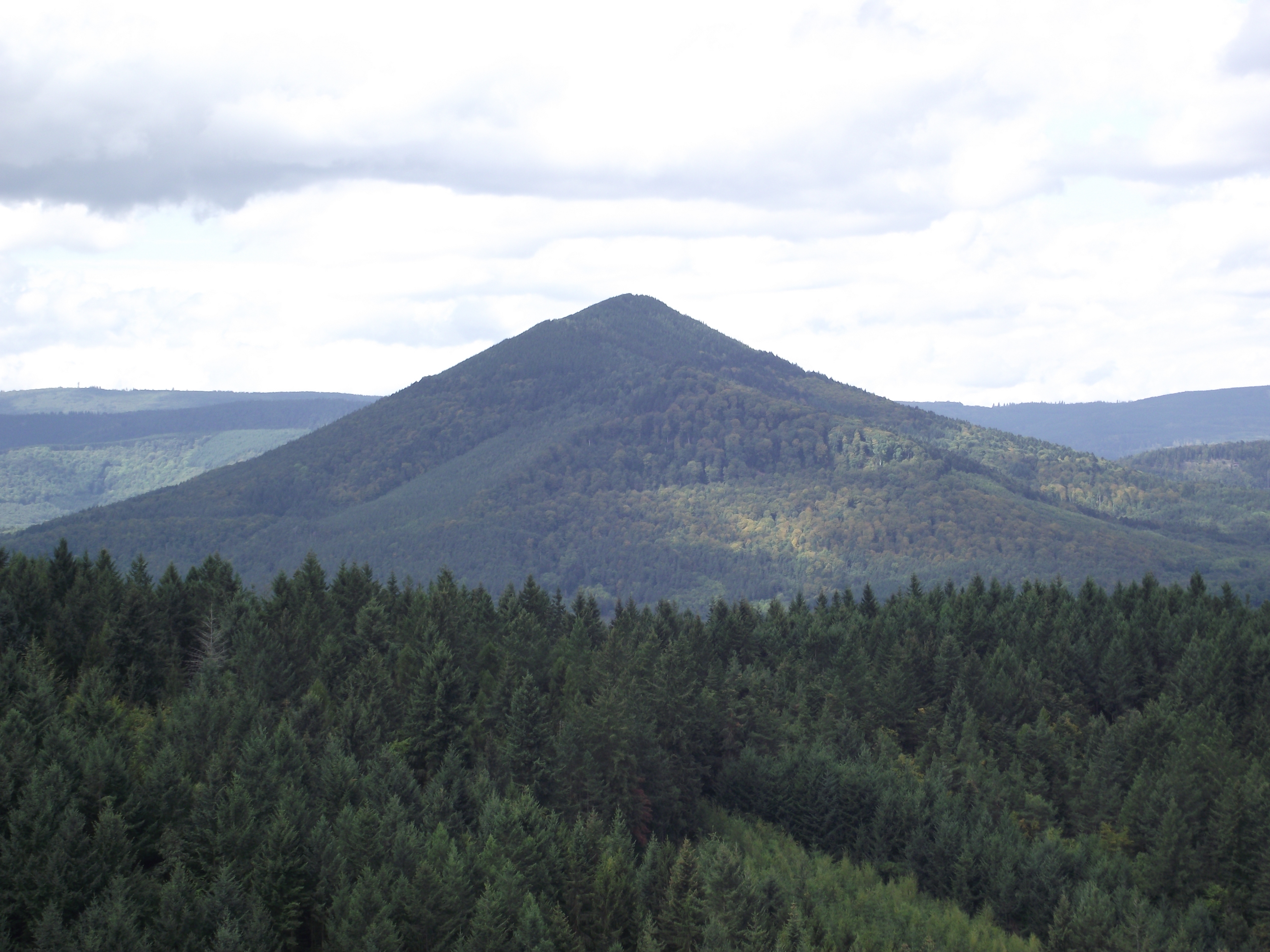 Sommet de l'Ungersberg (901 m) dans les Vosges près de Sélestat.